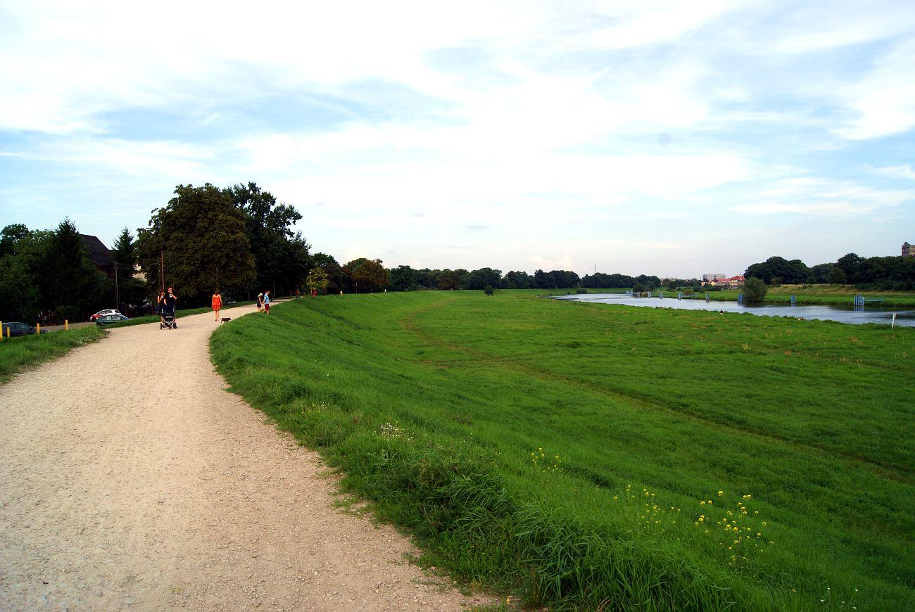 Wał Karłowicki - widok od strony ul. Zawalnej w stronę Mostu Warszawskiego.